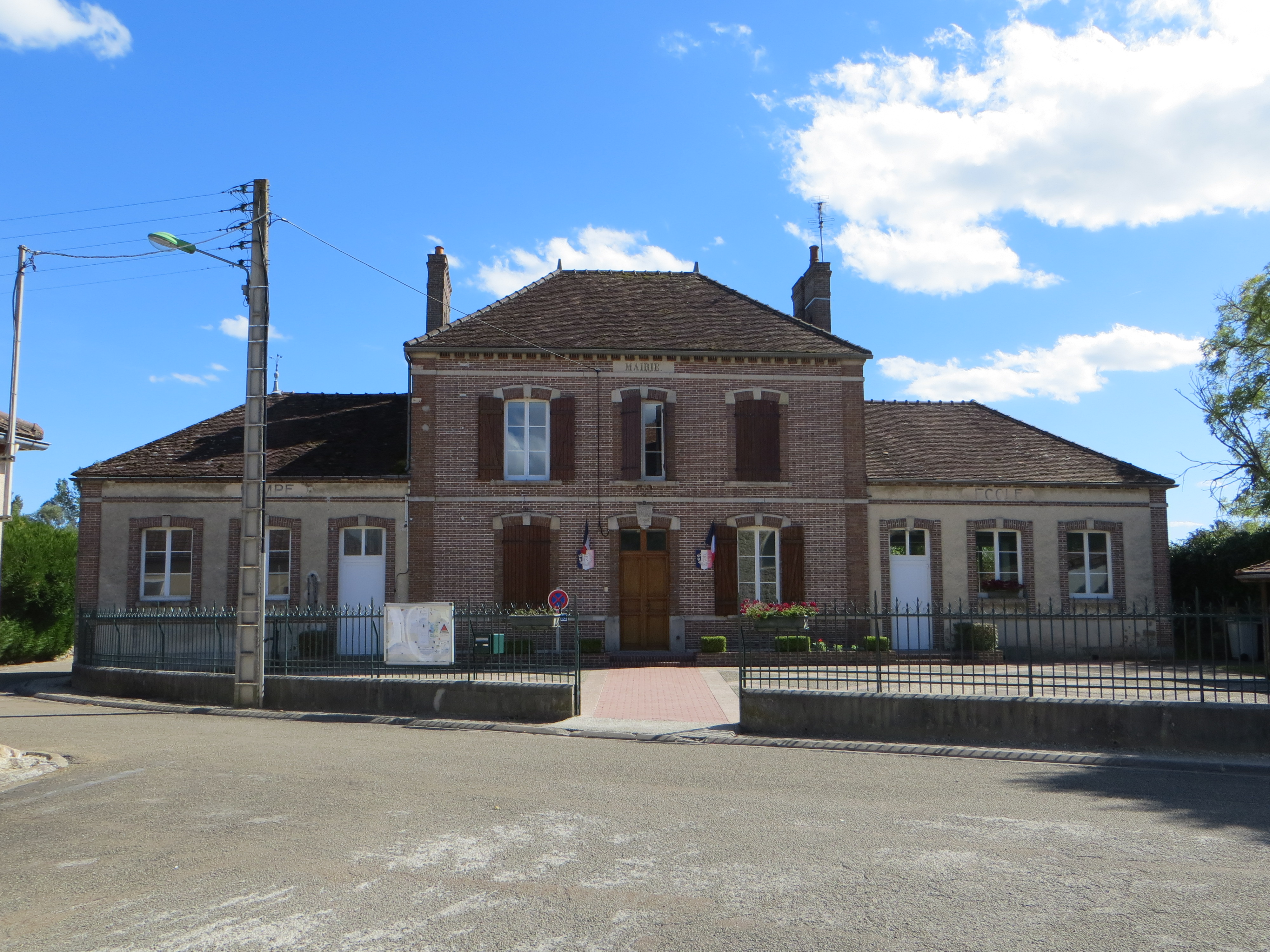 Vue de la mairie